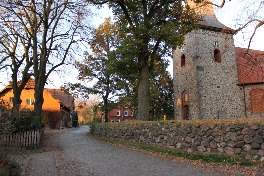 Ortskern Siebeneichen